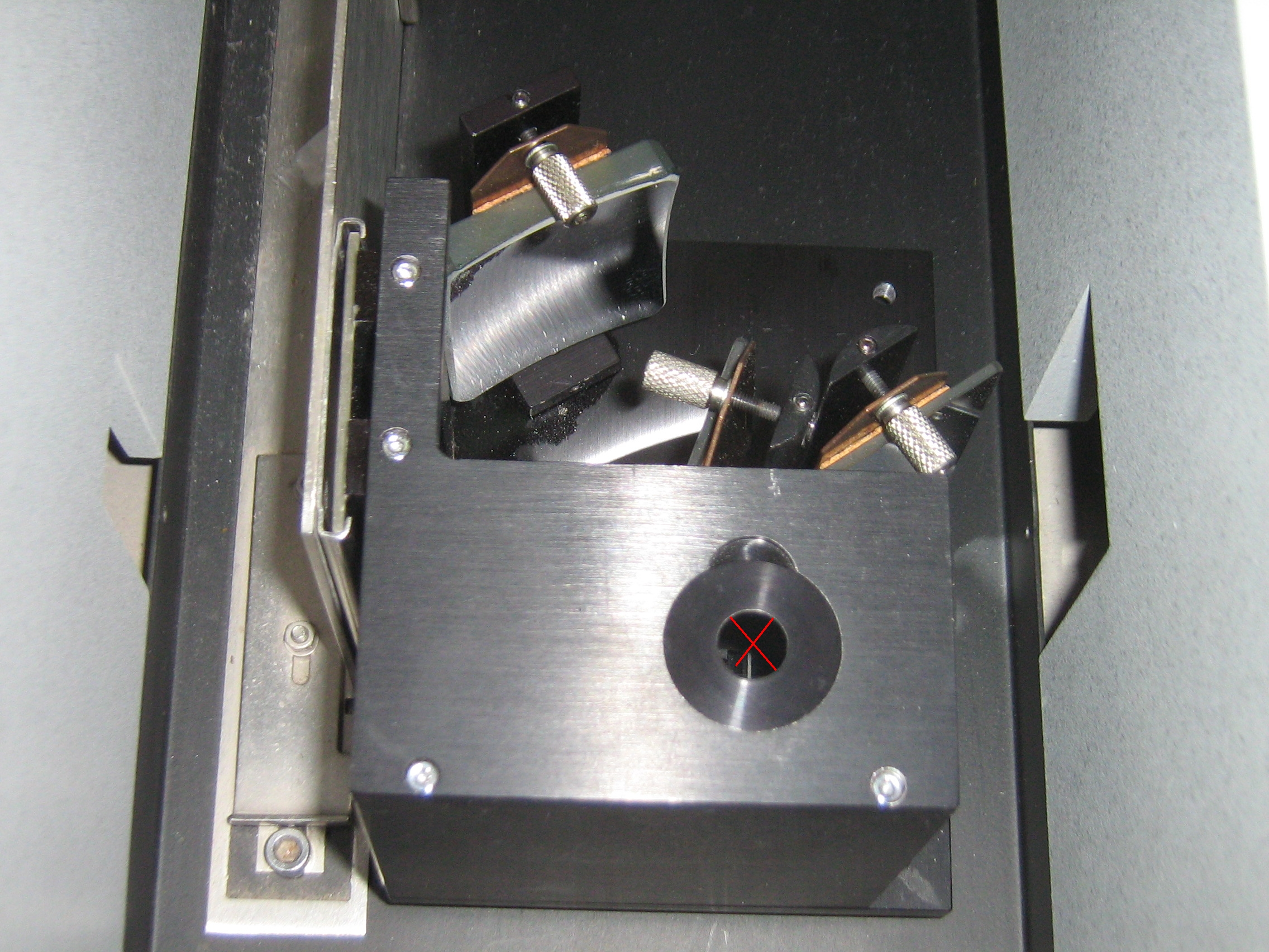 Reflexions-Messeinrichtung für die Infrarotspektroskopie, eingebaut in den Strahlengang. Die Probe wird an der durch das rote "X" gekennzeichneten Stelle angebracht.